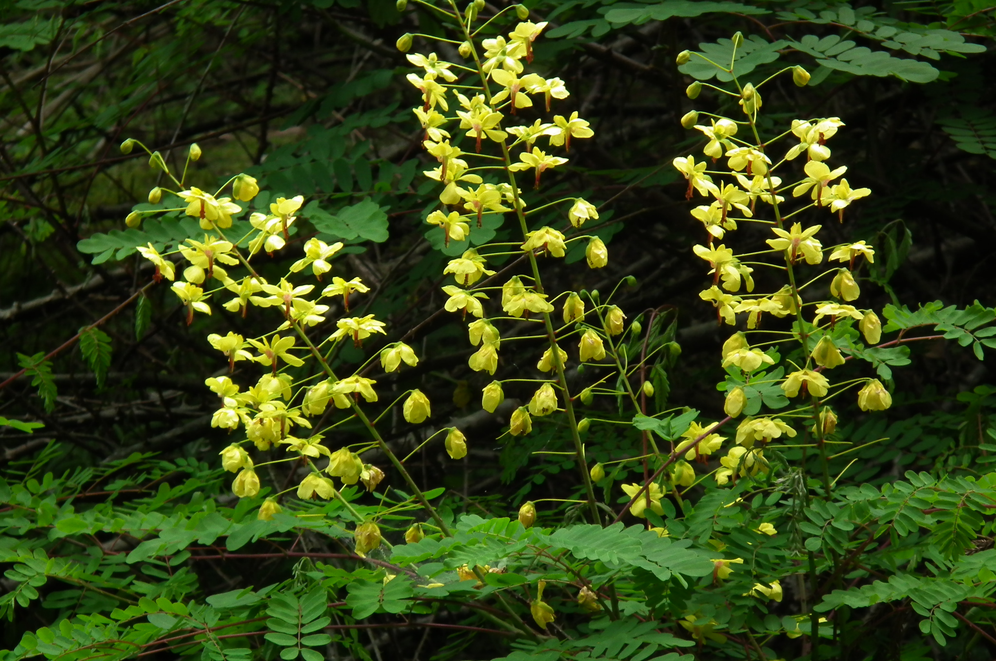 Caesalpinia decapetala var. japonica 蛇結茨 ジャケツイバラ 界 : 植物界 Plantae 門 : 被子植物門 Magnoliophyta 綱 : 双子葉植物綱 Magnoliopsida 目 : マメ目 Fabales 科 : [ジャケツイバラ科] Caesalpiniaceae 属 : ジャケツイバラ属 Caesalpinia 種 : ジャケツイバラ Caesalpinia decapetala var. japonica